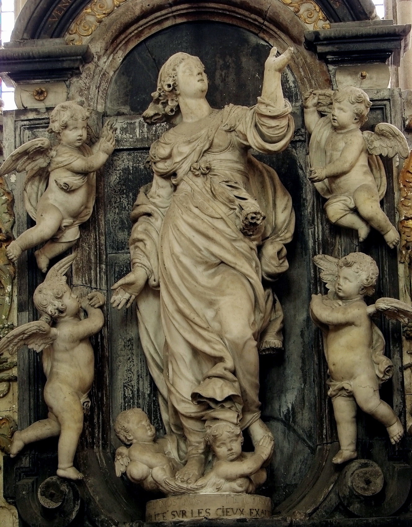 Retable de l'Assomption, marbre blanc et noir, oeuvre de Nicolas Blasset, réalisée vers 1637 pour François de Fresne, maître de Puy. Chapelle Saint-Nicolas, Cathédrale d'Amiens. . Cathédrale d'Amiens.